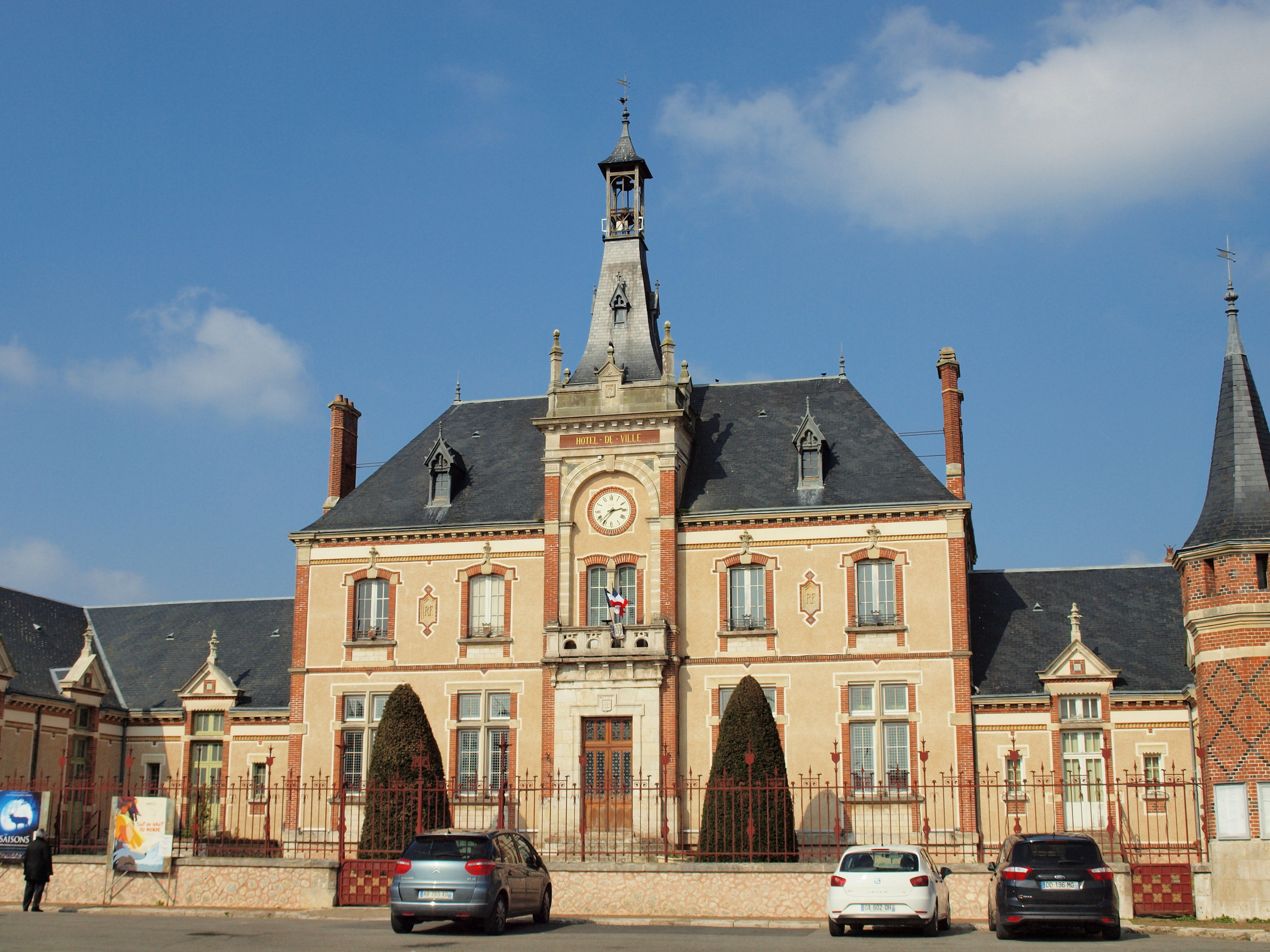 Brou (Eure-et-Loir, France)